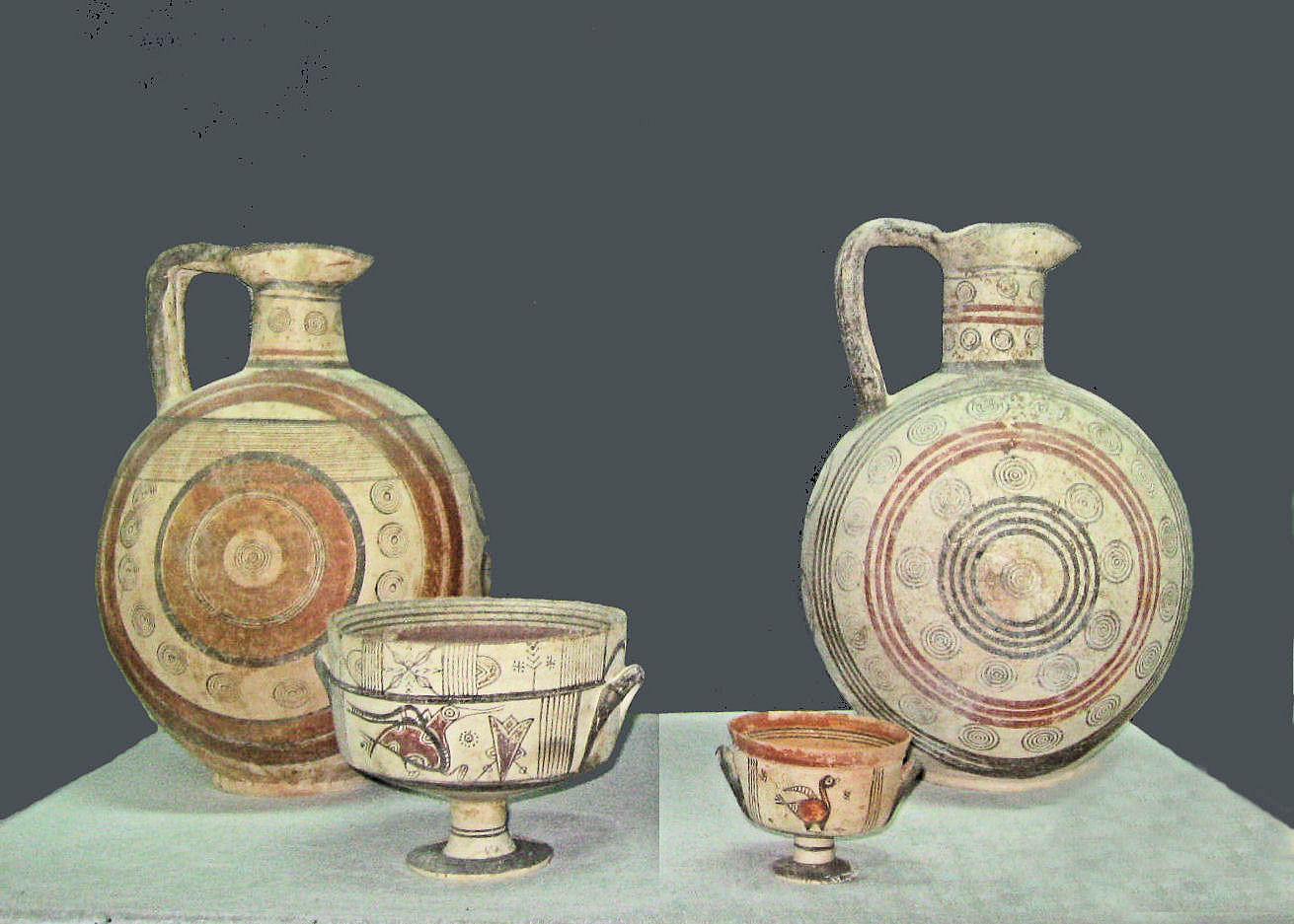 Aryballoi, Bichrome Ware, Archaic I, 750-600 v. Chr., aus Salamis (Cyprus), Archäologisches Museum St. Barnabas / Salamis (Nordzypern)